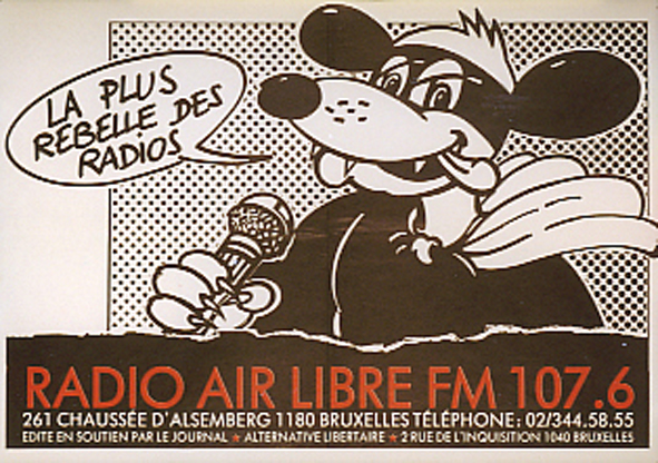 Une affiche pour Radio Air Libre éditée par le journal Alternative Libertaire (Belgique).